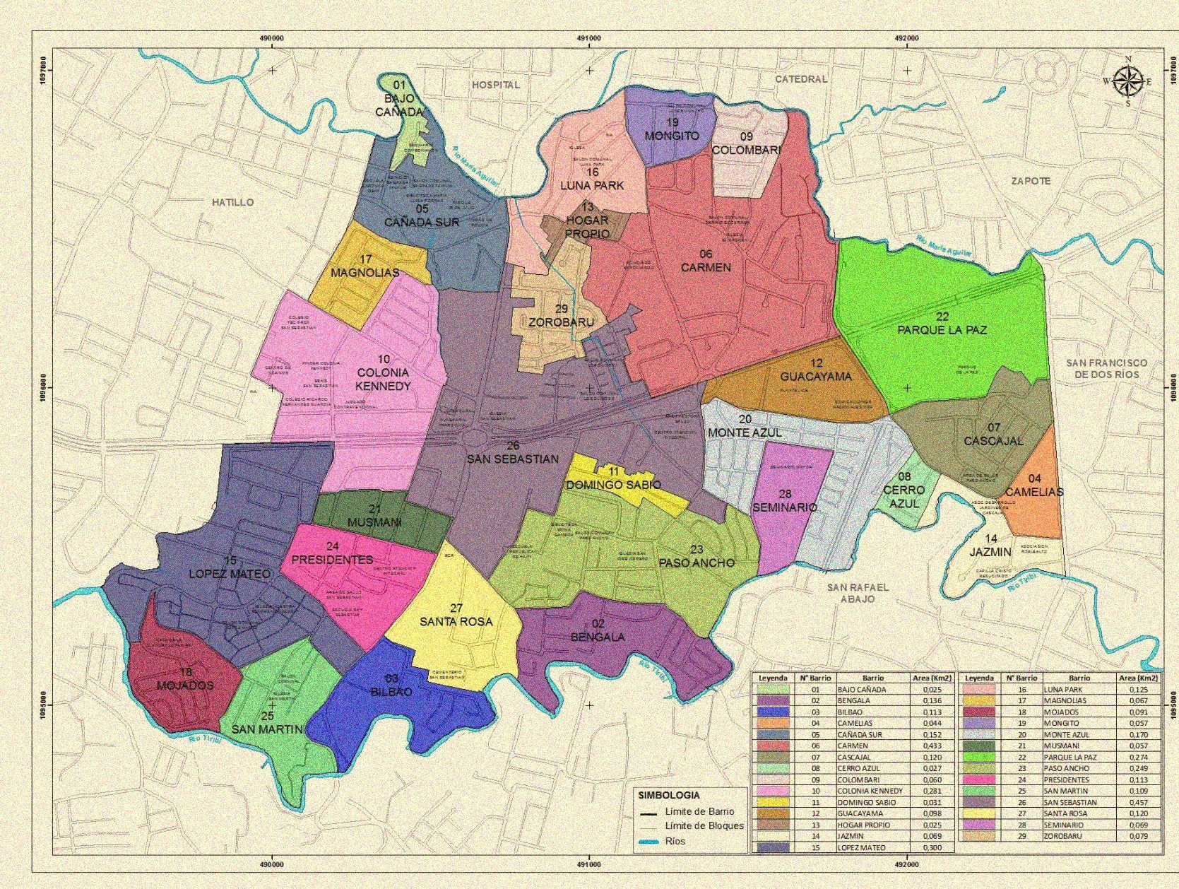 Mapa de San Sebastián